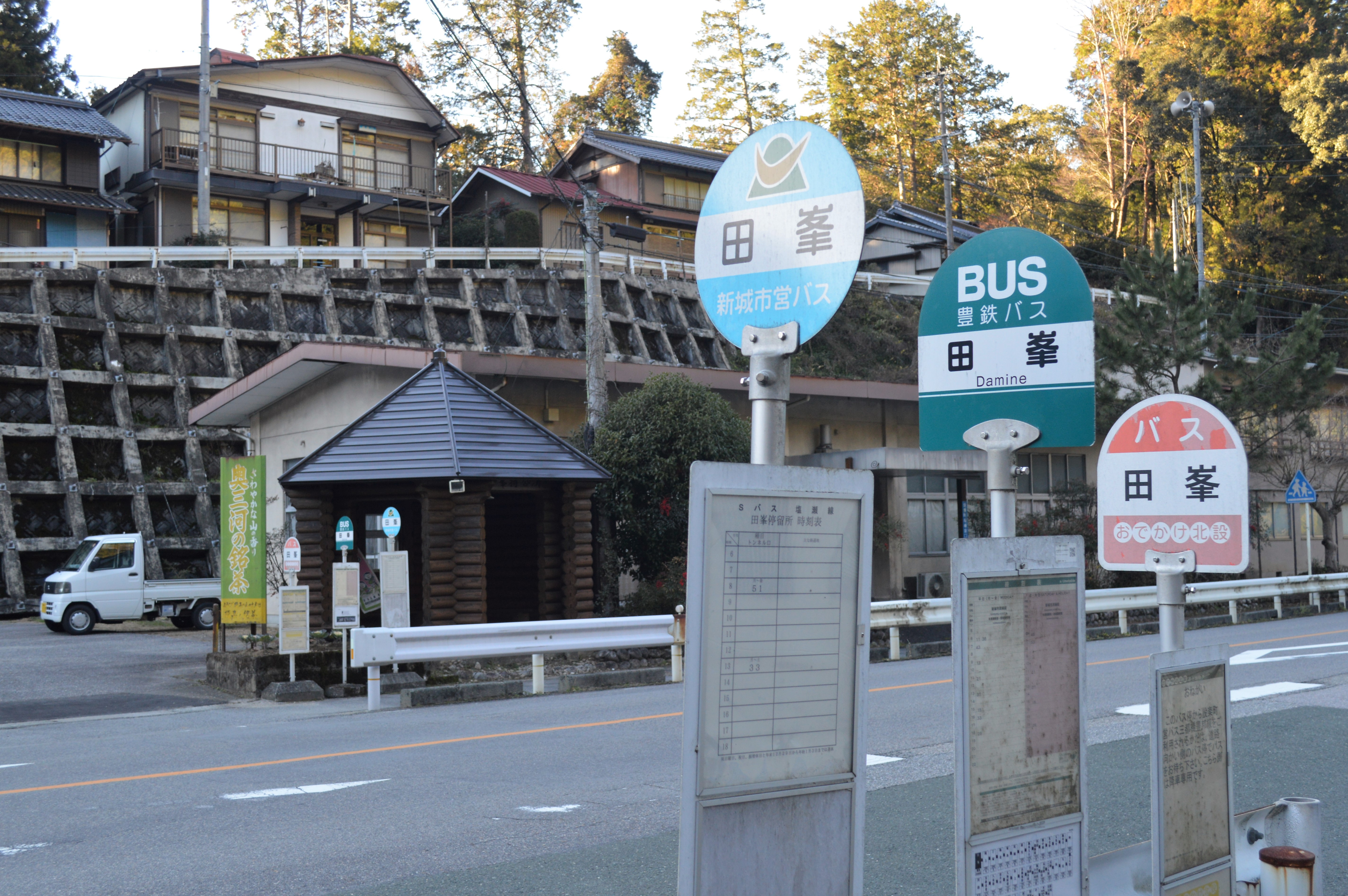 愛知県北設楽郡設楽町にある「田峯」バス停。豊鉄バス、新城市営バス、おでかけ北設。